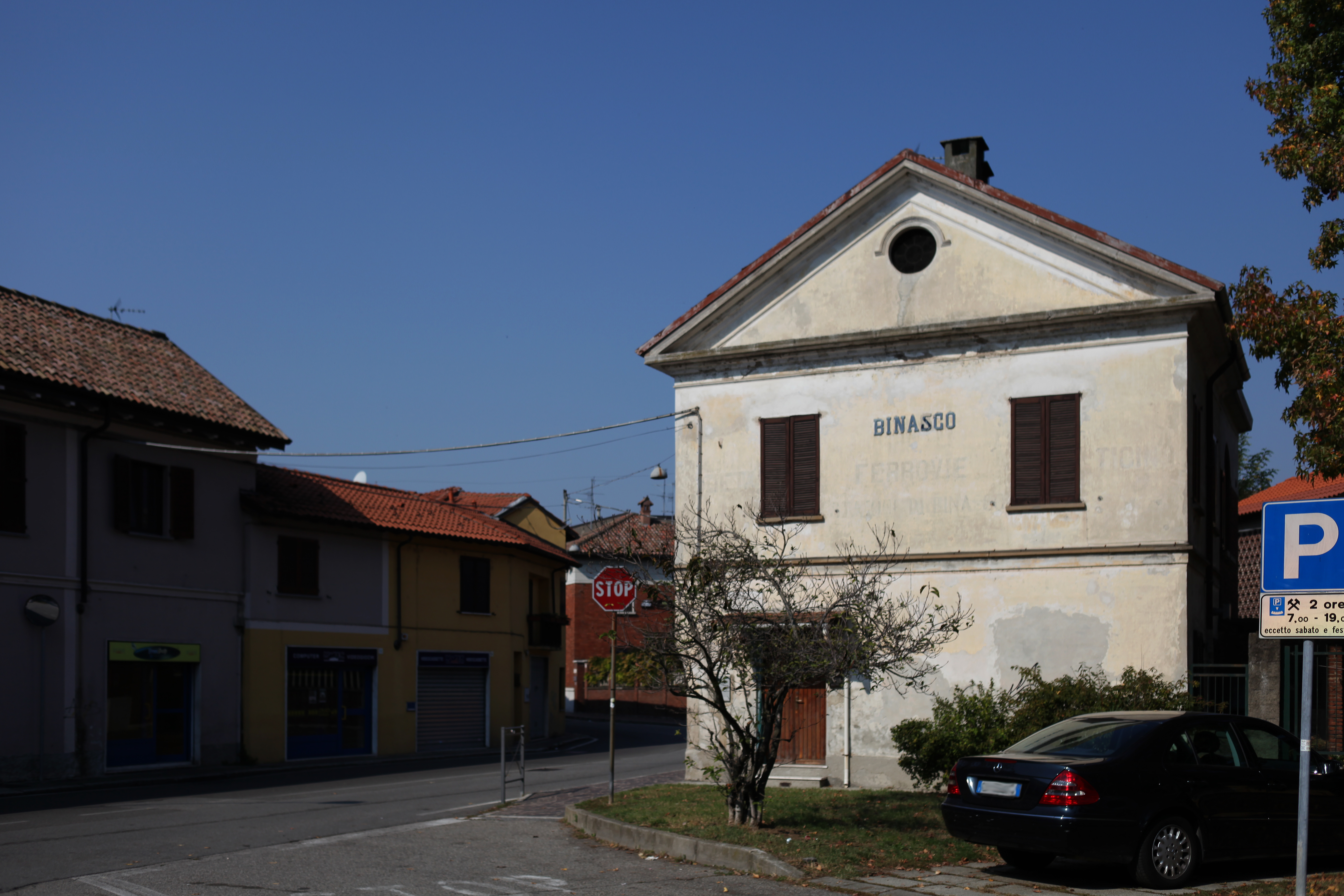 La vecchia stazione del tram di Binasco sulla linea Milano-Binasco-Pavia